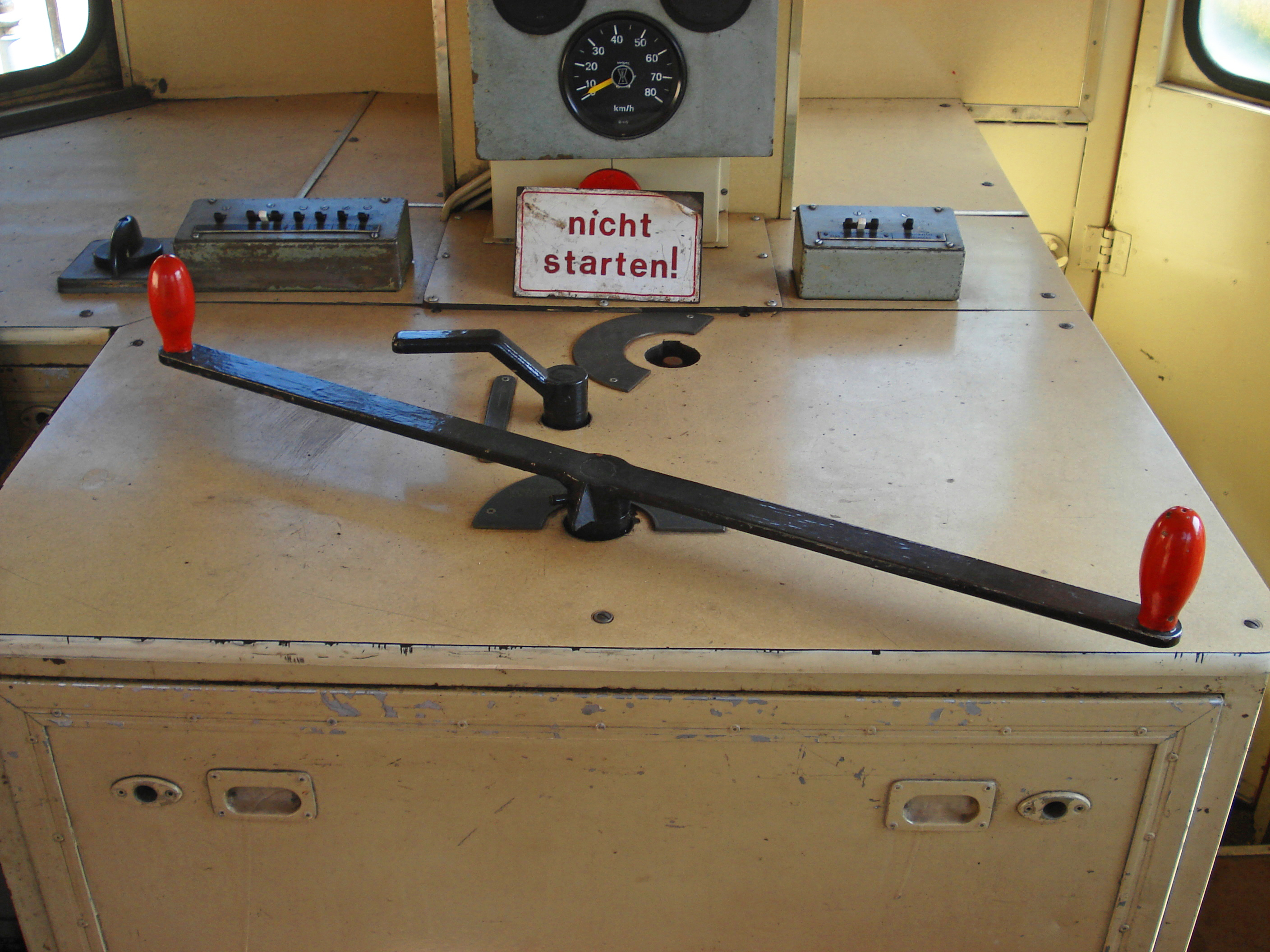 Das Foto zeigt den Führerstand der WSV 2091.07. Diese Lok hat keine so tiefgreifenden Modernisierungen wie ihre Schwesterloks 2091.09 und 2091.11 erfahren.